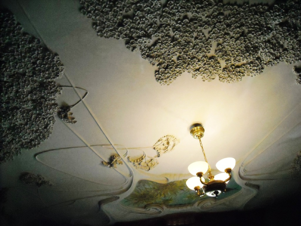 Malaya Nikitiskaya to Церковь Вознесения Господня в Сторожах, у Никитских ворот («Большое Вознесение»)